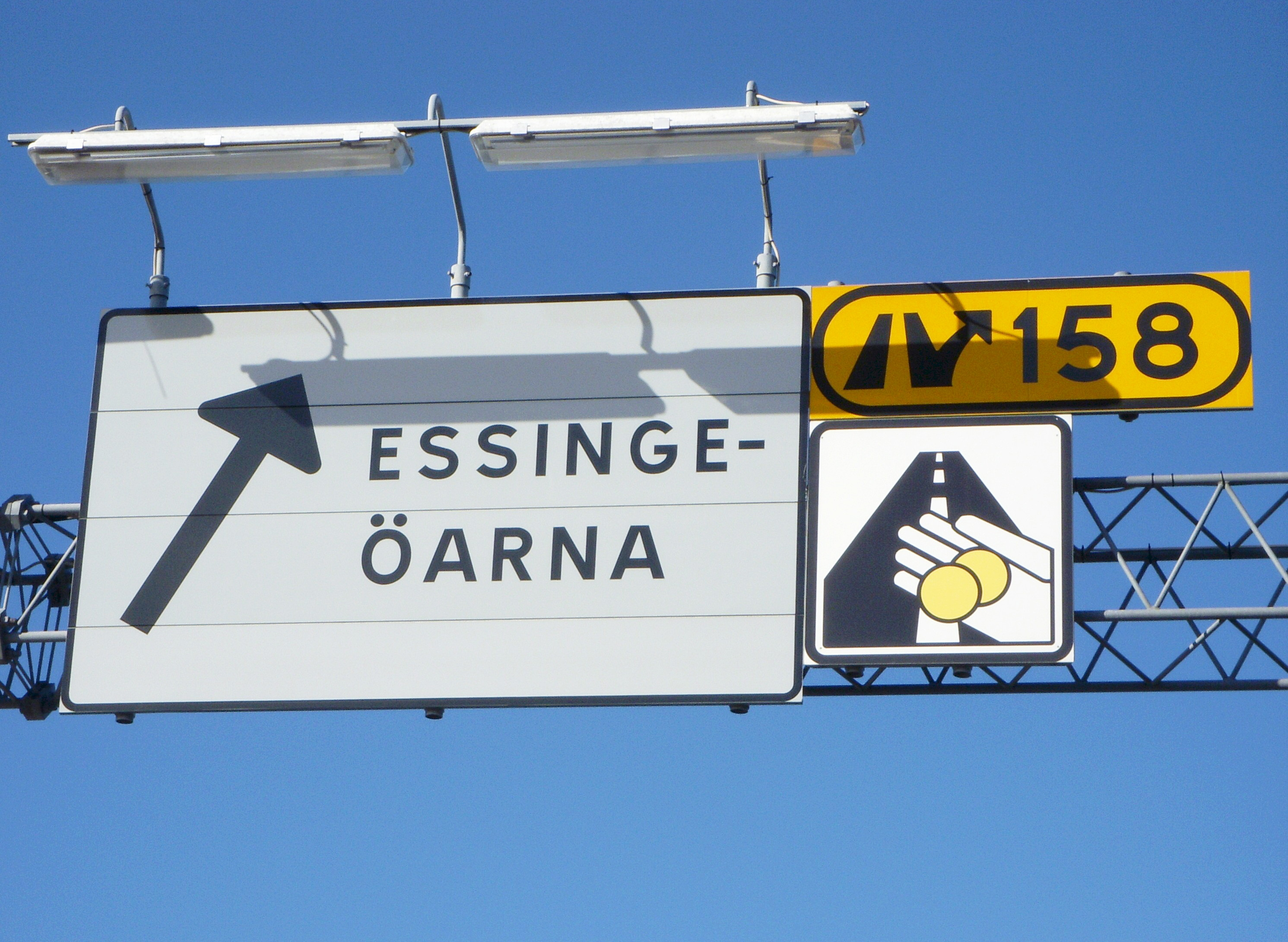 Skyltportal på Essingeleden i Stockholm